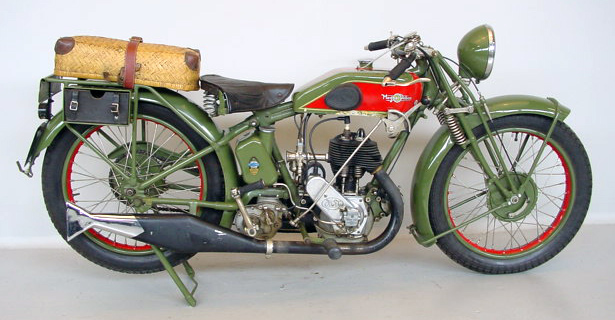 Sujet:En 350er Magnat_Debon BST vun 1929 Source:Dëst Wierk kënnt vun Yesterdays Antique Motorcycles aus dem Classic Motorcycle Archive.